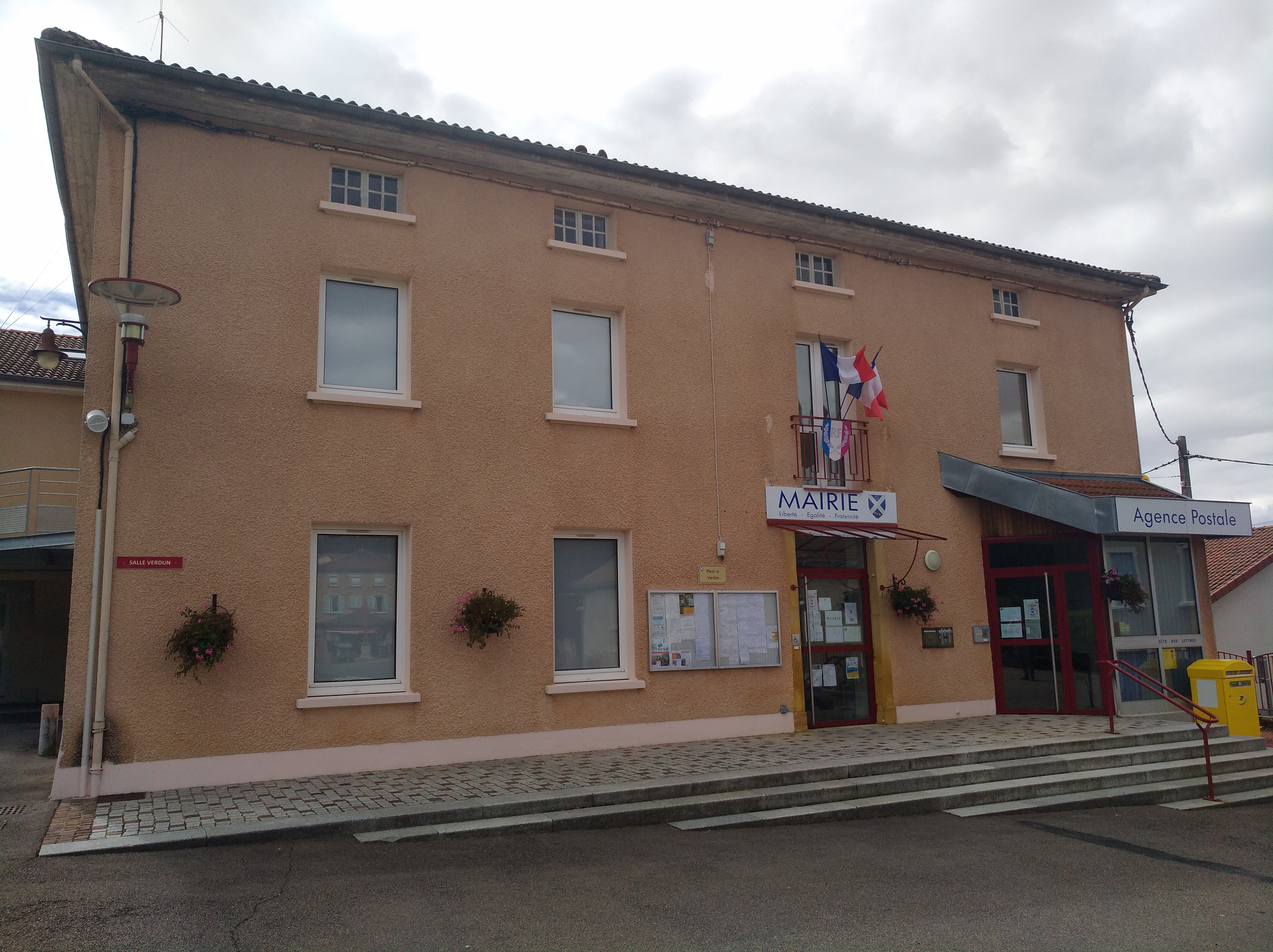 Mairie du Cergne, dans le département de la Loire.